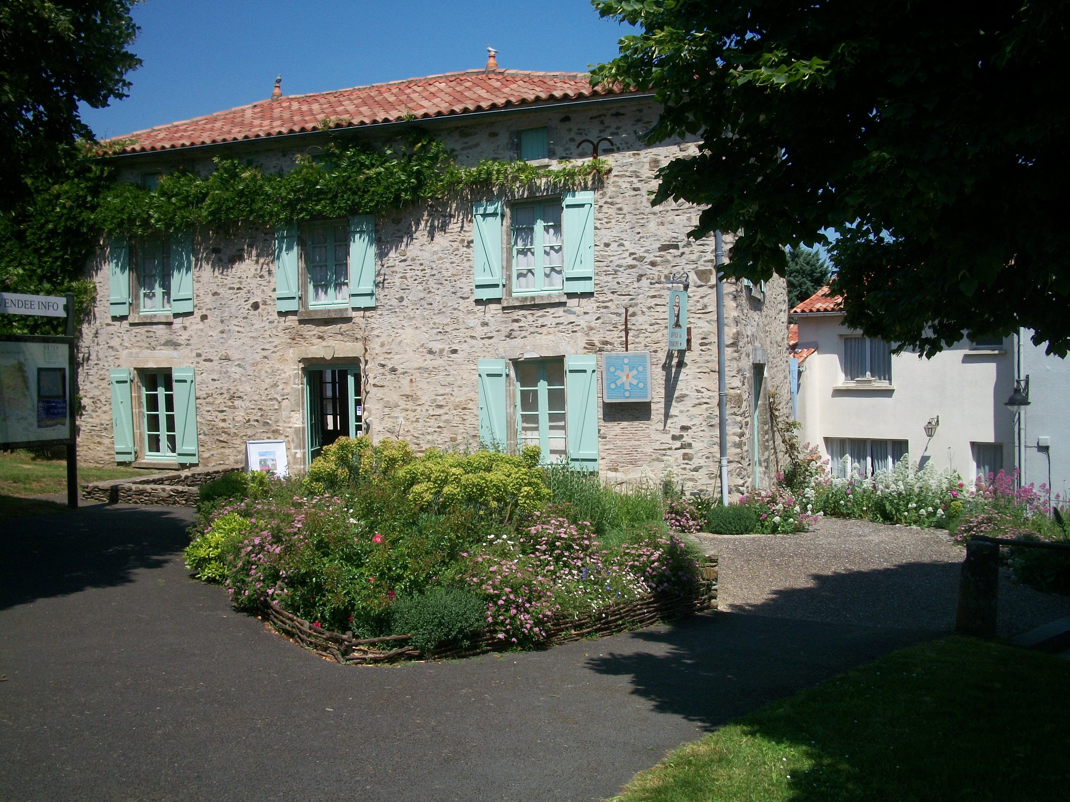 Vous y trouverez toutes les informations sur la légende sur la Fée Mélusine.